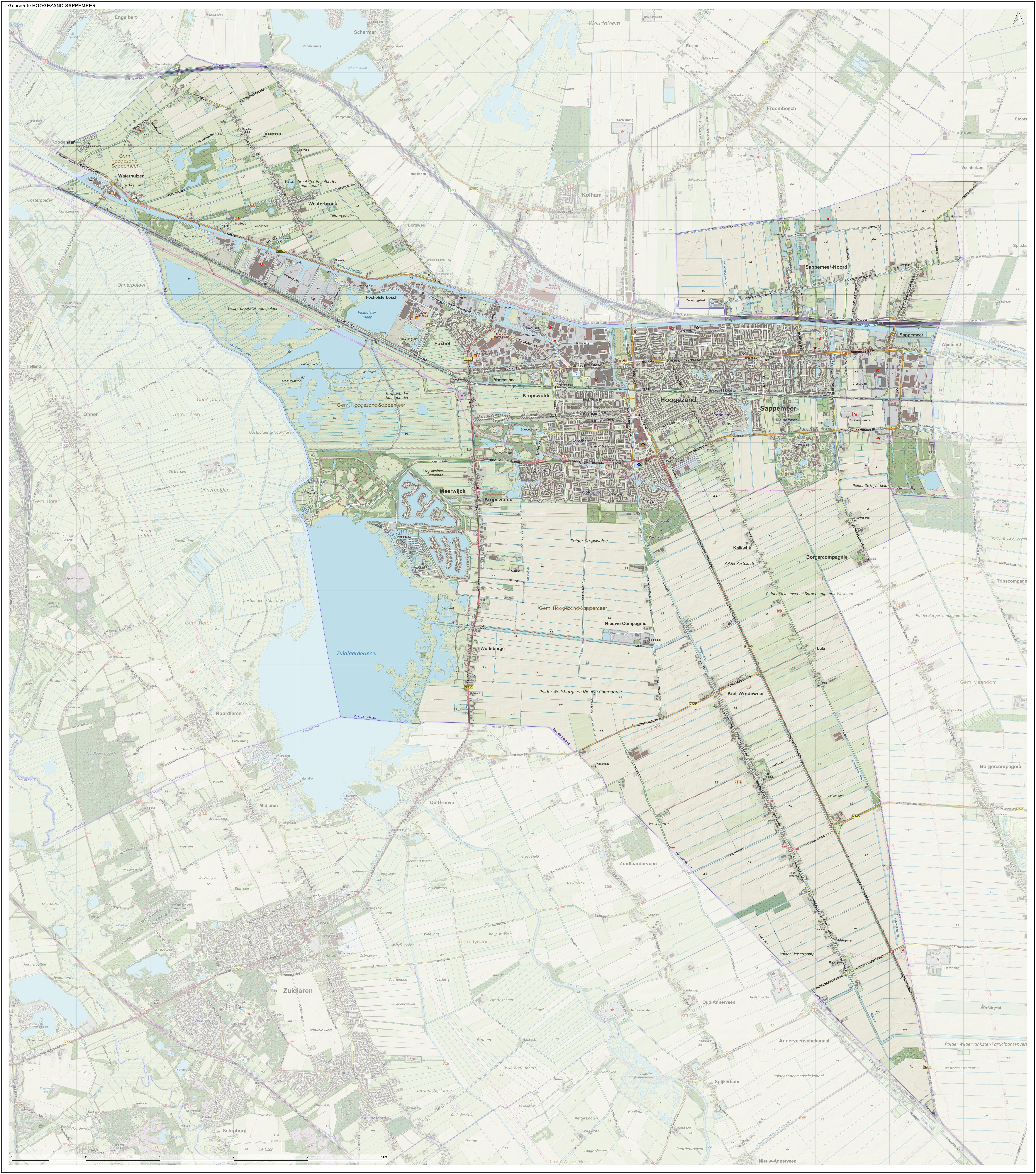 Topografische gemeentekaart. Resolutie: 400 pixels/km. Kaartbeeld samengesteld uit de open geodata van de Top10NL en Top25namen (Kadaster), Creative Commons-BY licentie. Gebouwvlakken uit open geodata BAG extract. Wegen uit de OpenStreetMap, OpenStreetMap community. Reliëfschaduw uit de Actuele Hoogtekaart AHN2. Samenstelling en kleurenschema: Jan-Willem van Aalst, met QGIS. Zie ook de Legenda.